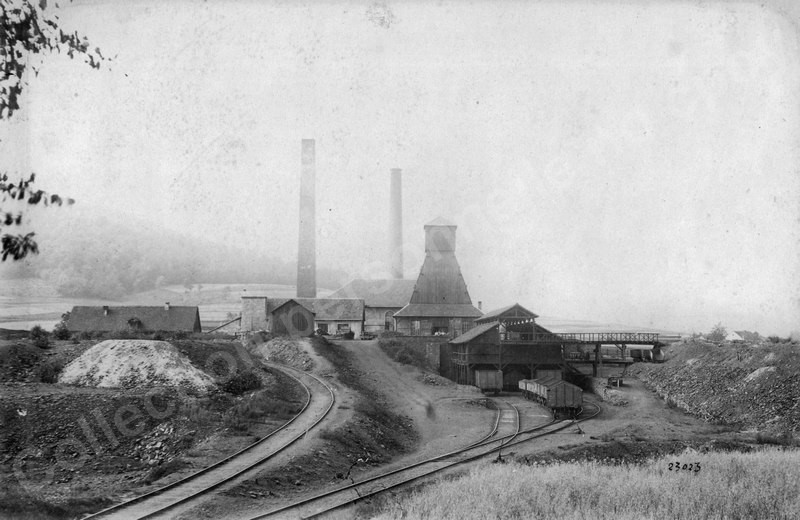 Le carreau du puits Notre-Dame.